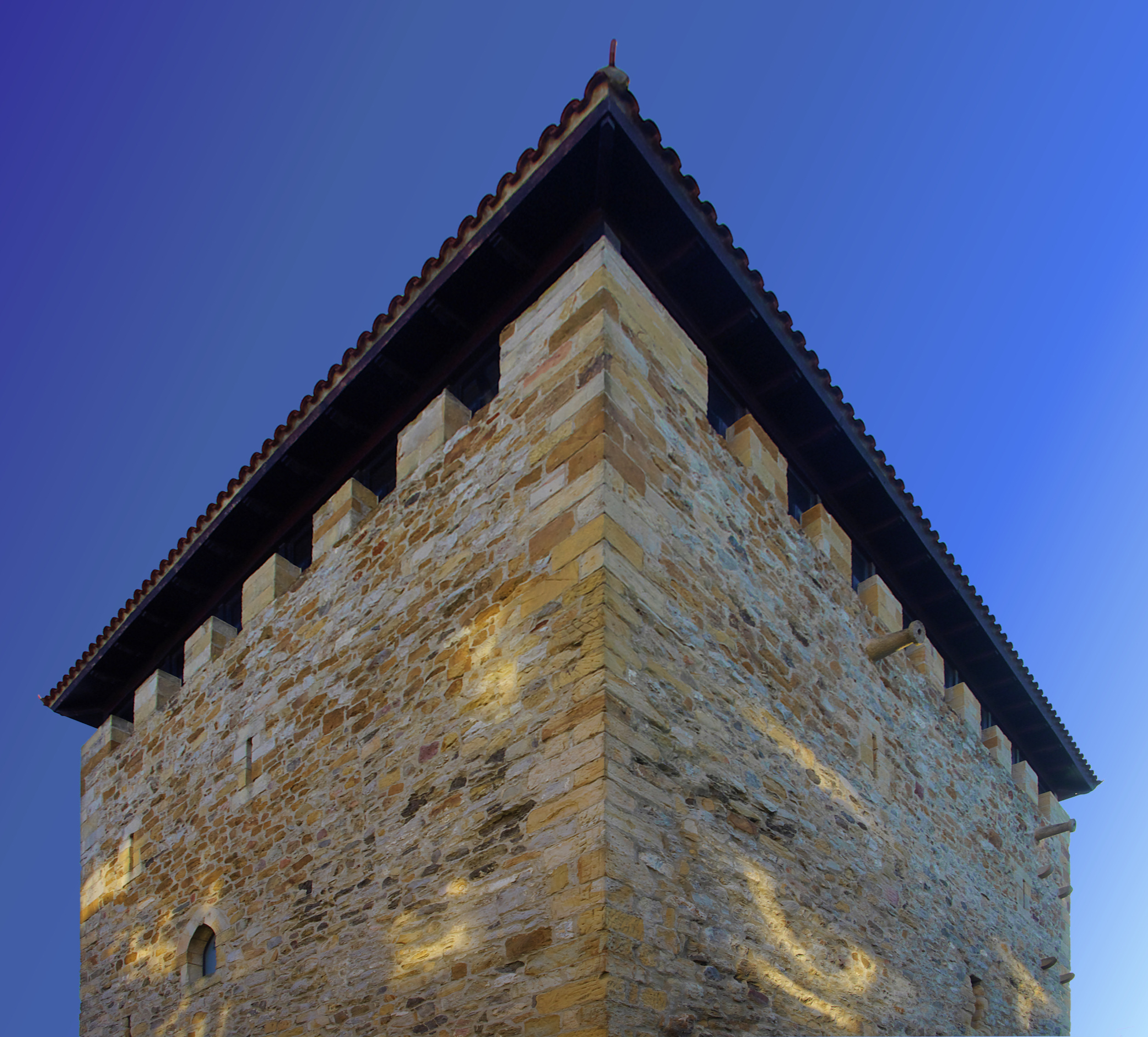 Casa Torre de Salazar desde un ángulo imposible